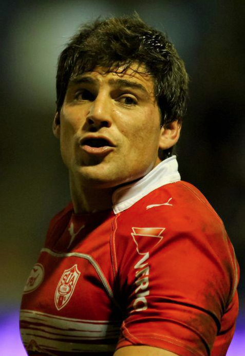 Ruso avramovic agen